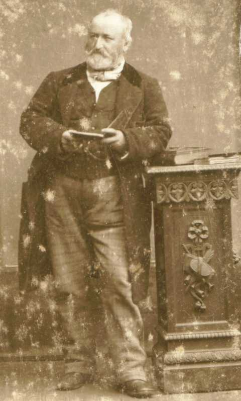 Charles Abel, Historiker aus Metz, Lothringen, Mitglied des deutschen Reichstages.